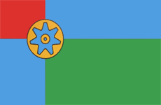 Прапор Молочанська